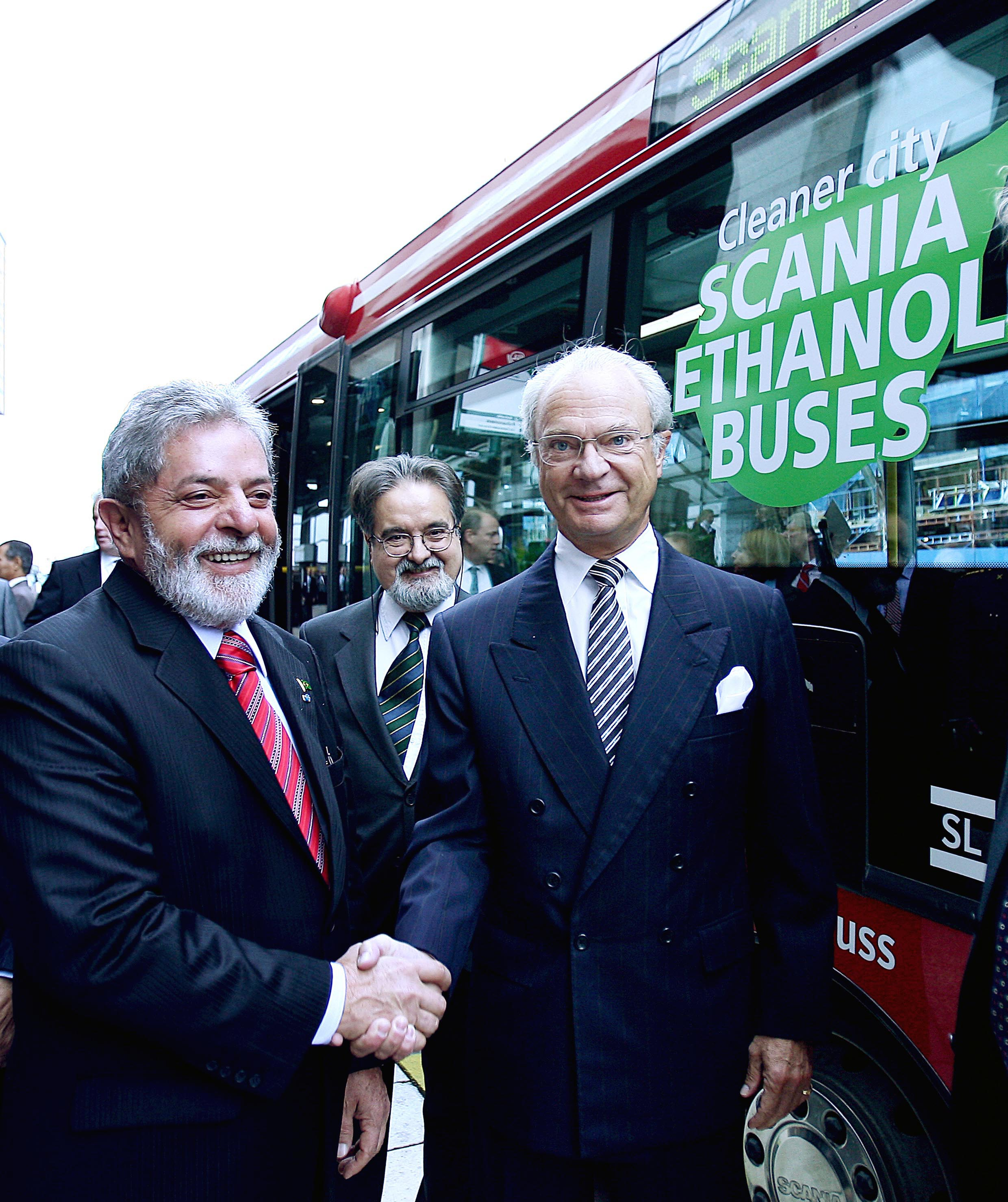 Estocolmo (Suécia) - O presidente Luiz Inácio Lula da Silva, o ministro Celso Amorim e o rei Carlos XVI Gustavo em frente a um dos 400 ônibus movidos a etanol que circulam em Estocolmo.